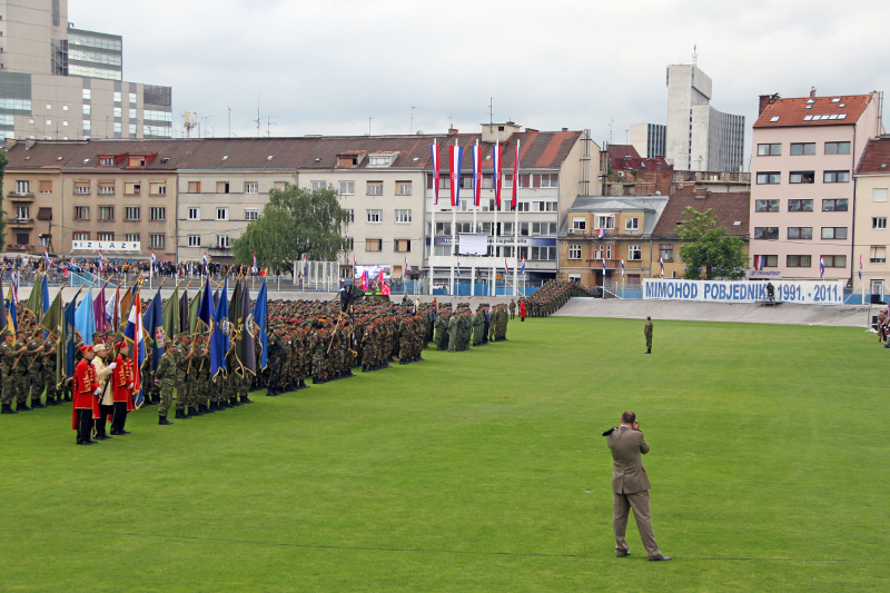 20 godina osnivanja Oružanih snaga Republike Hrvatske, Dana OS RH i Dana HKoV-a.